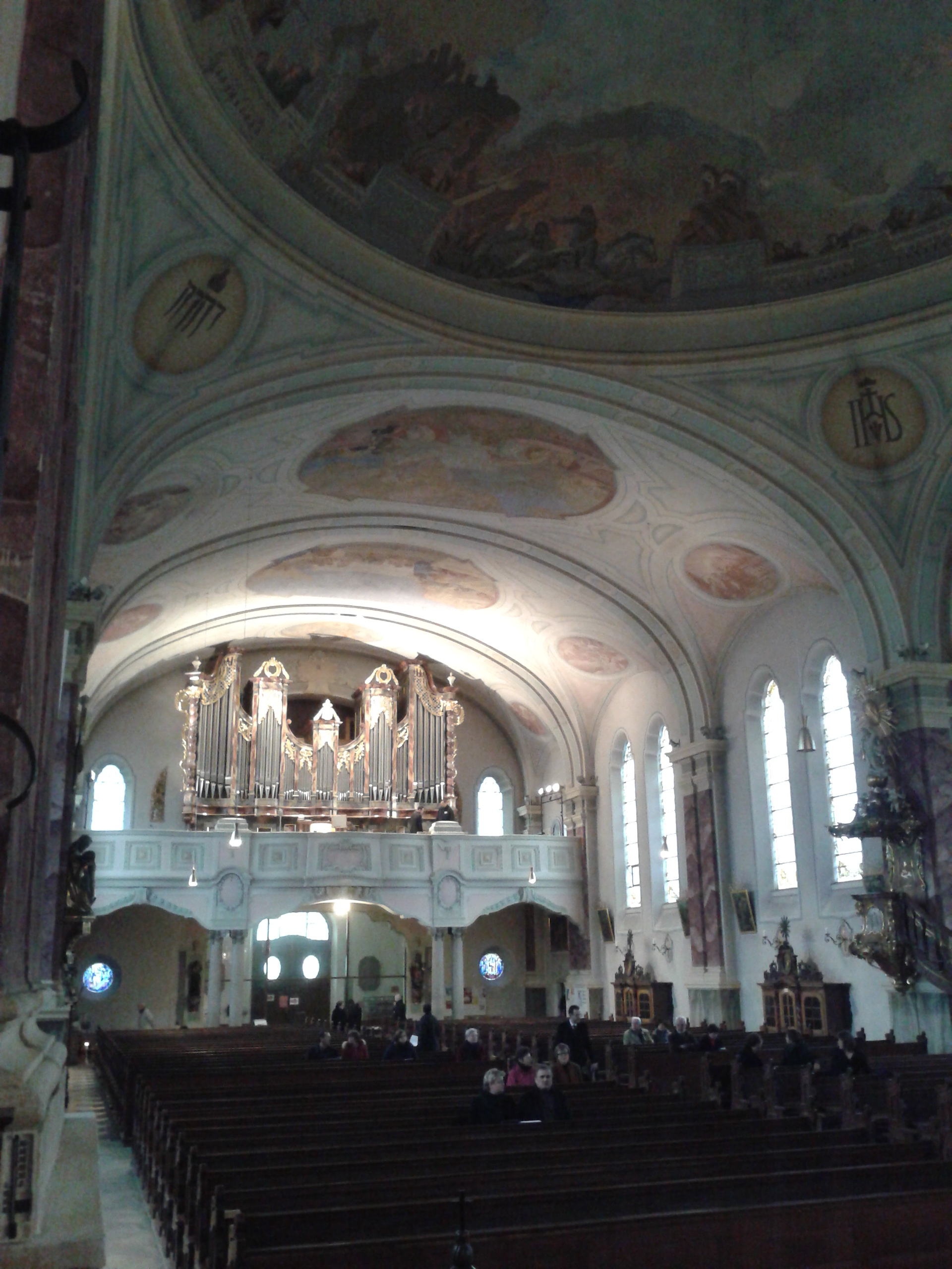 Blick durchs Kirchenschiff zur Sandtner-Orgel der Stadtpfarrkirche St. Josef (Reinhausen)